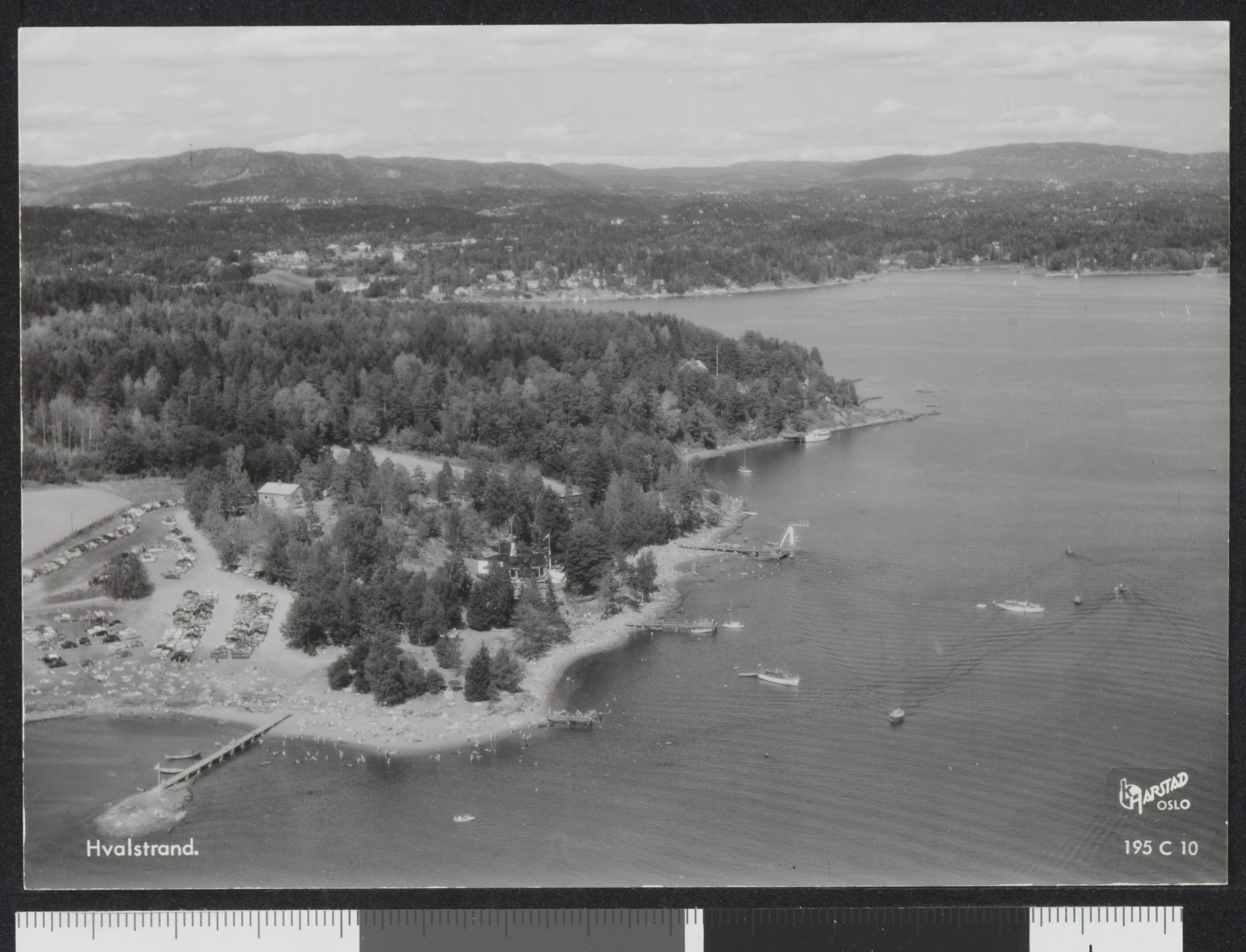 Bildet er hentet fra Nasjonalbibliotekets bildesamling Hvalstrand, Asker, Akershus